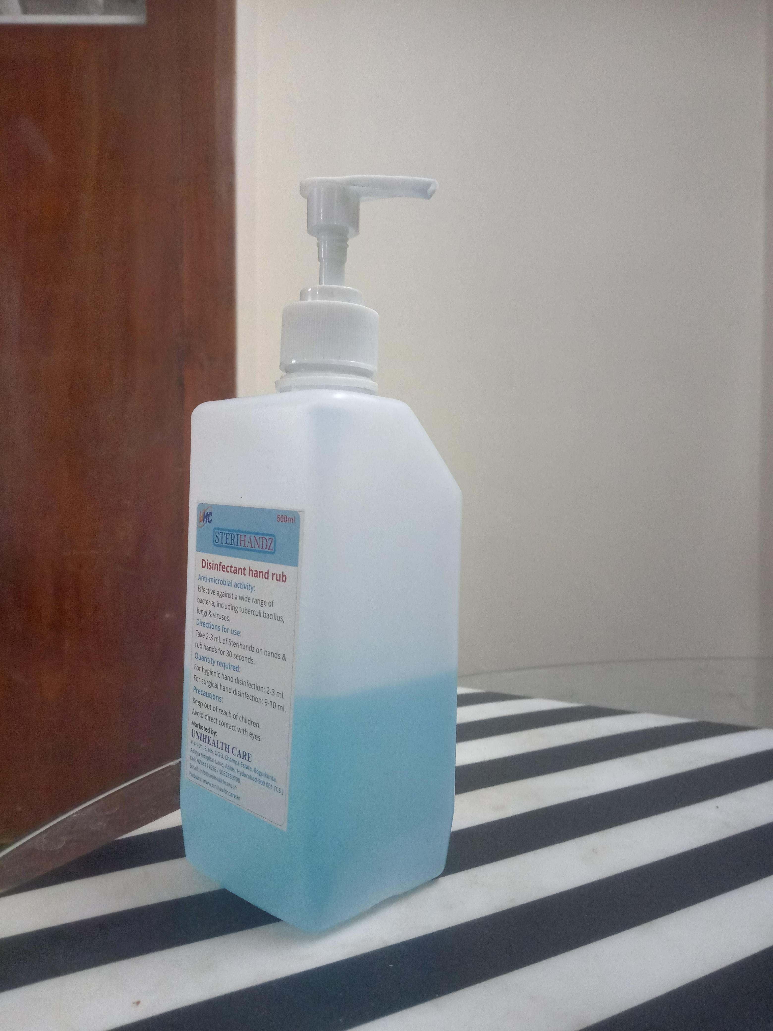 hand sanitizer bottle